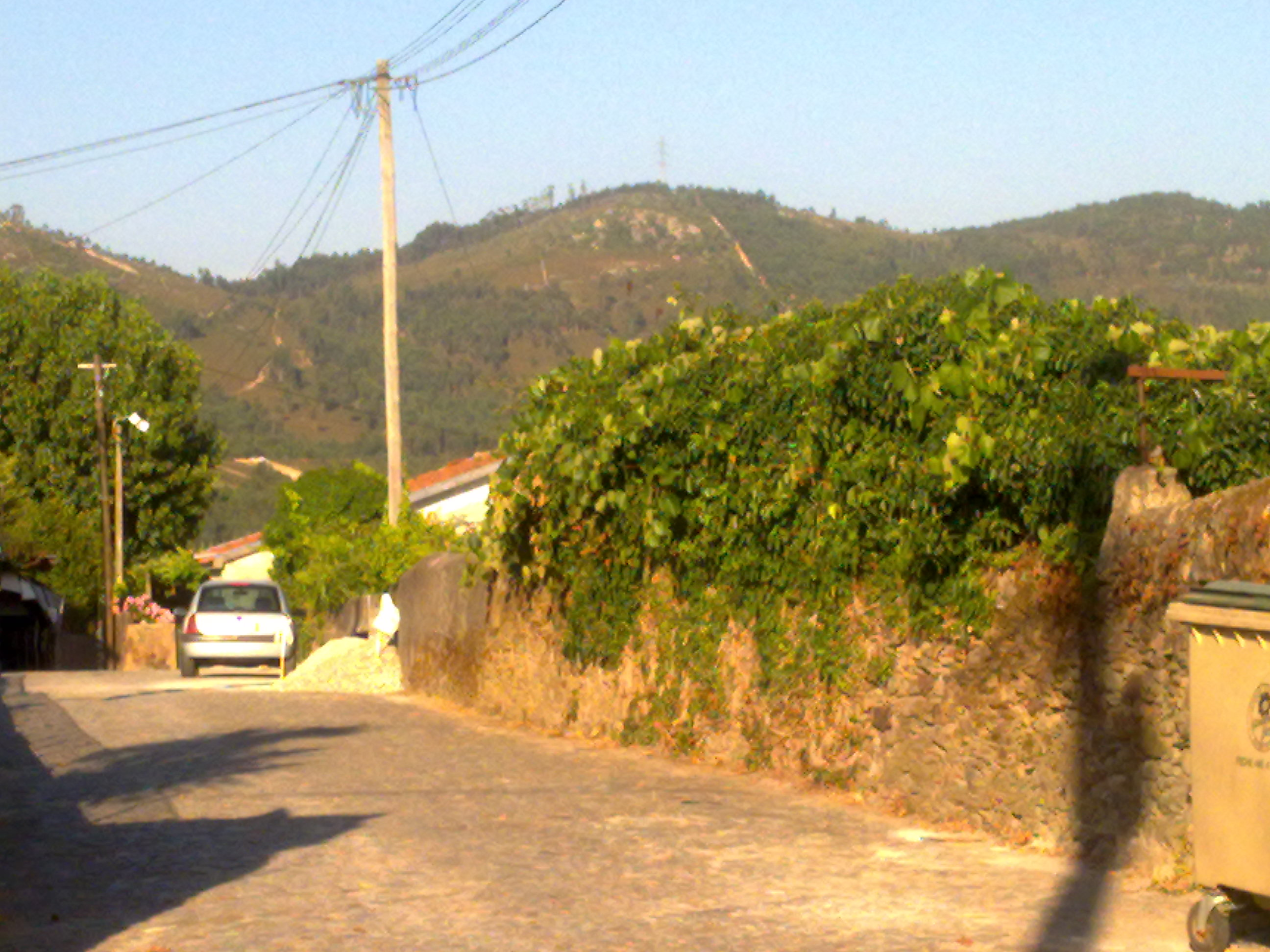 vista para serra de castiçal